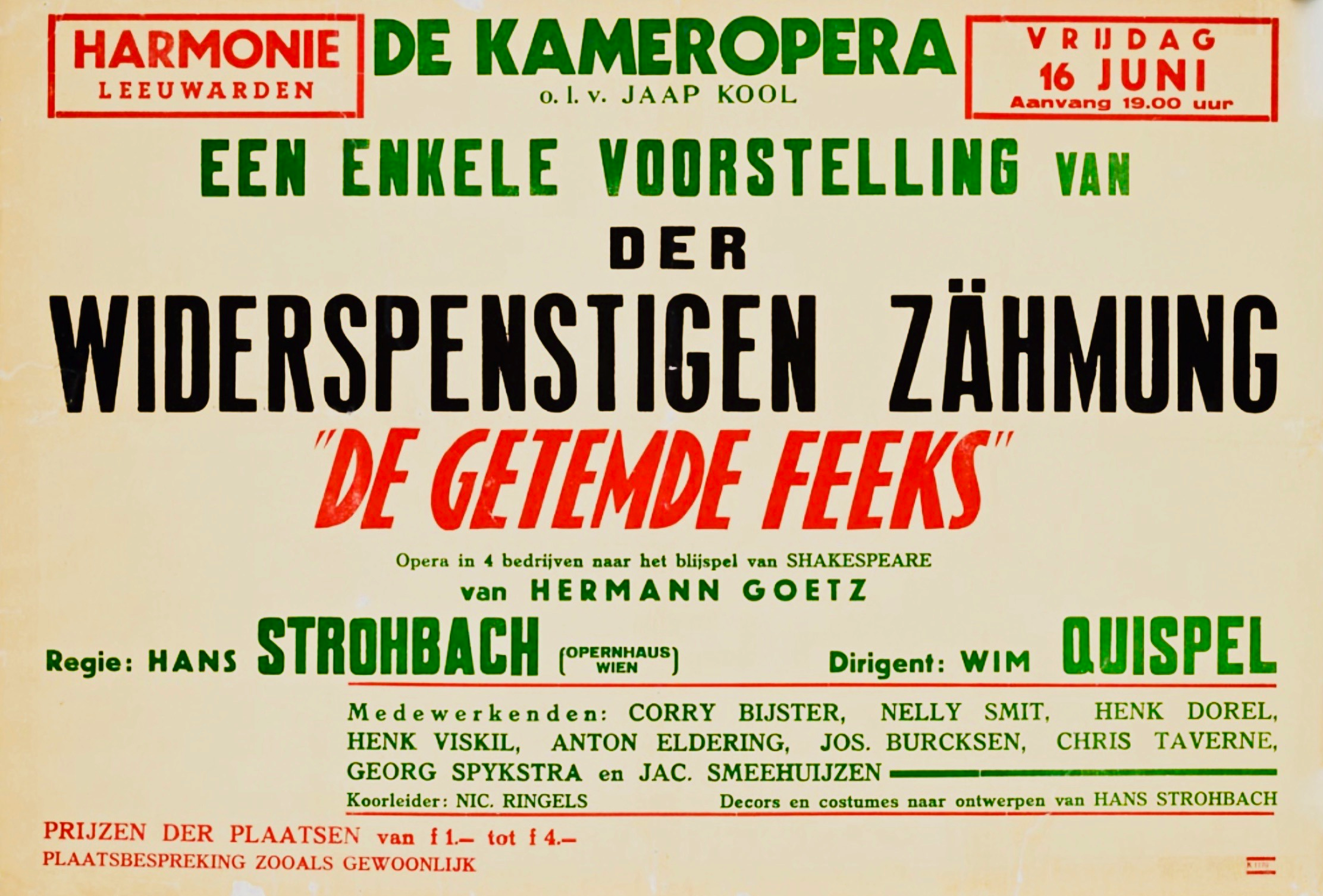 De Kameropera unter Leitung von Jaap Kool (1891–1959): Einzelvorstellung Der Widerspenstigen Zähmung, Oper in vier Aufzügen nach William Shakespeare von Hermann Goetz (1840–1876), Regie: Hans Strohbach (1891–1949), Dirigent: Wim Quispel